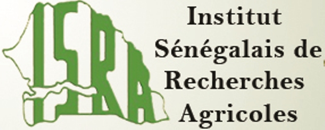 C' est un logo du centre de l'institut de recherche agricole situé au Sénégal.